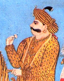 Tulajaji II